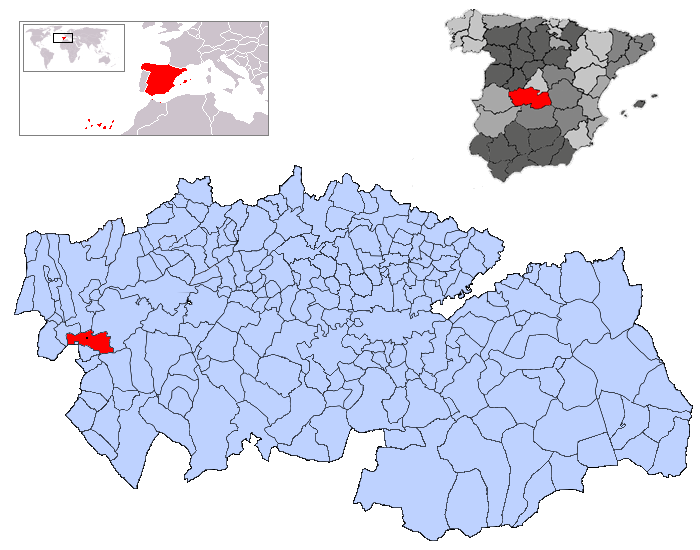 Alcolea de Tajo en la provincia de Toledo